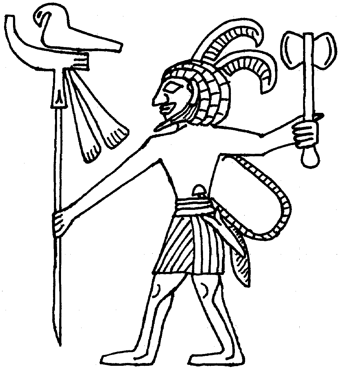 Second detail of the "hunter´s palette" (around 3.400 BC.)